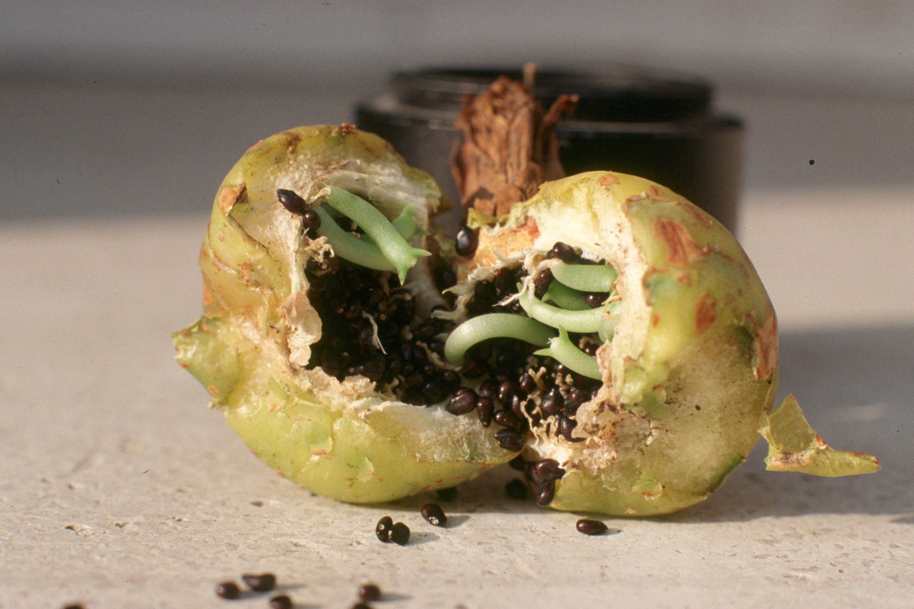 Fruto de cactácea. Semillas germinando en el interior del fruto cerrado. Real Jardín Botánico de Madrid.